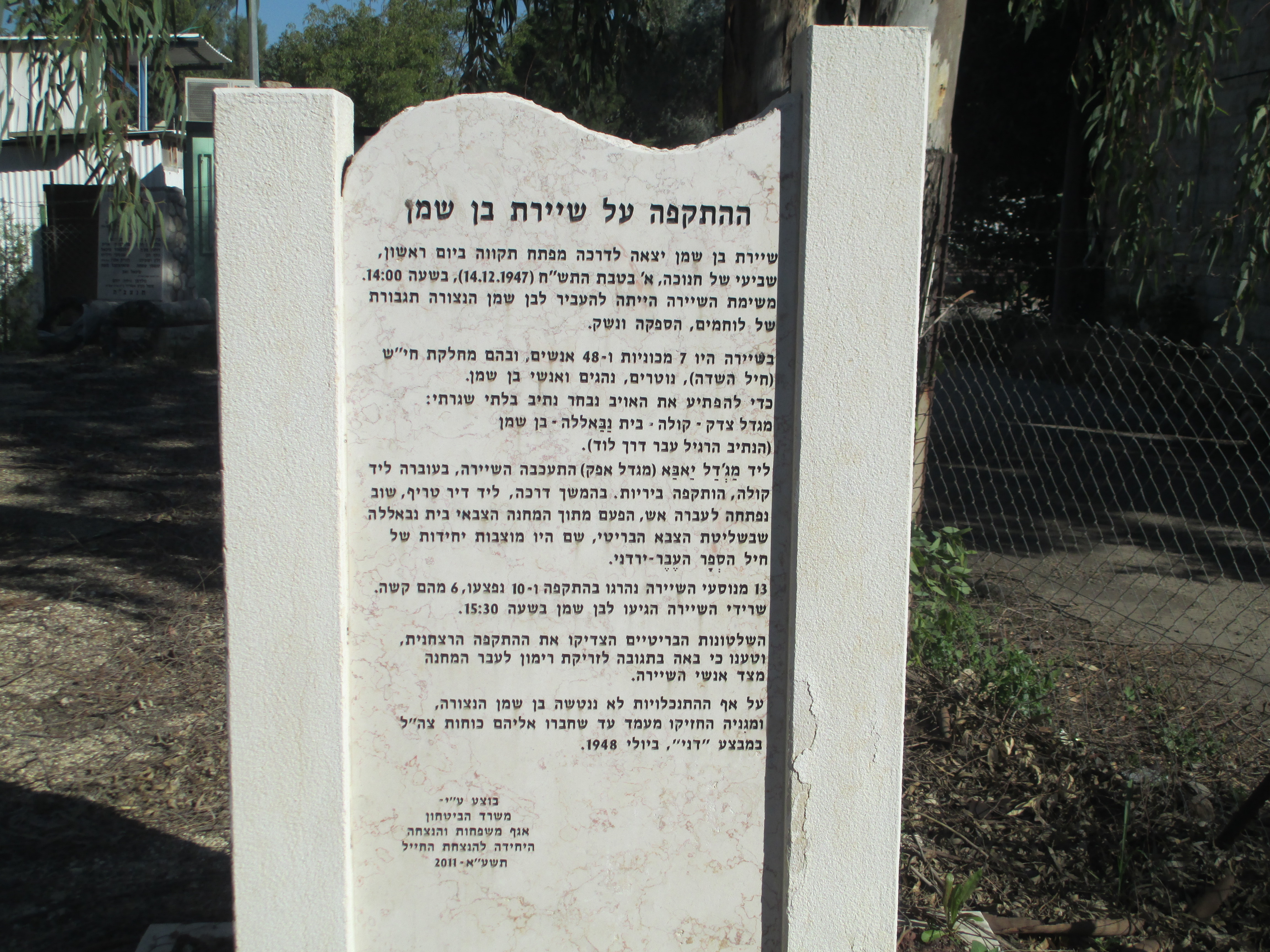 אתר זיכרון לשיירת בן שמן